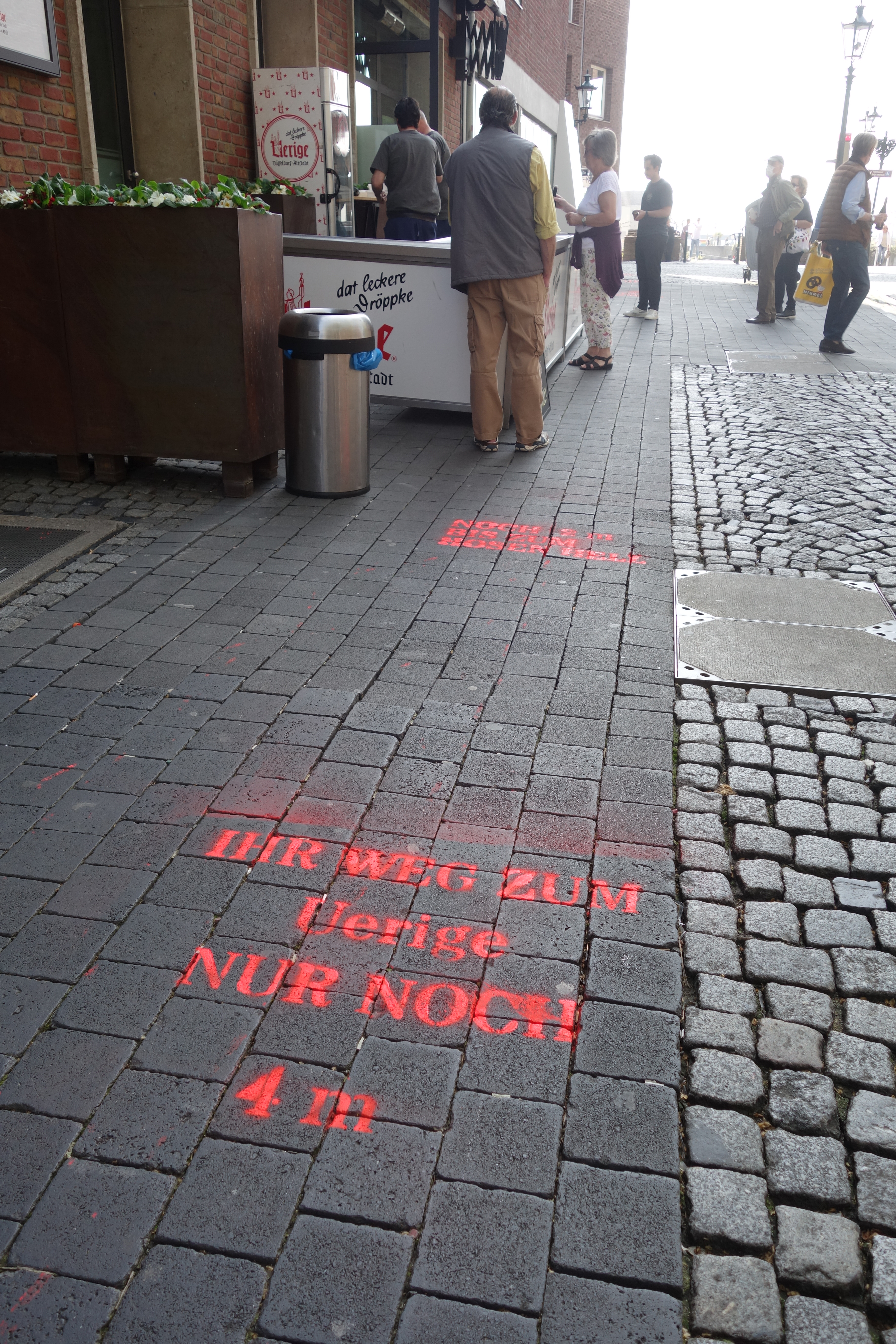 Ihr Weg zum Uerige nur noch 4 m. Düsseldorf, während der Corona-Krise, April 2020.